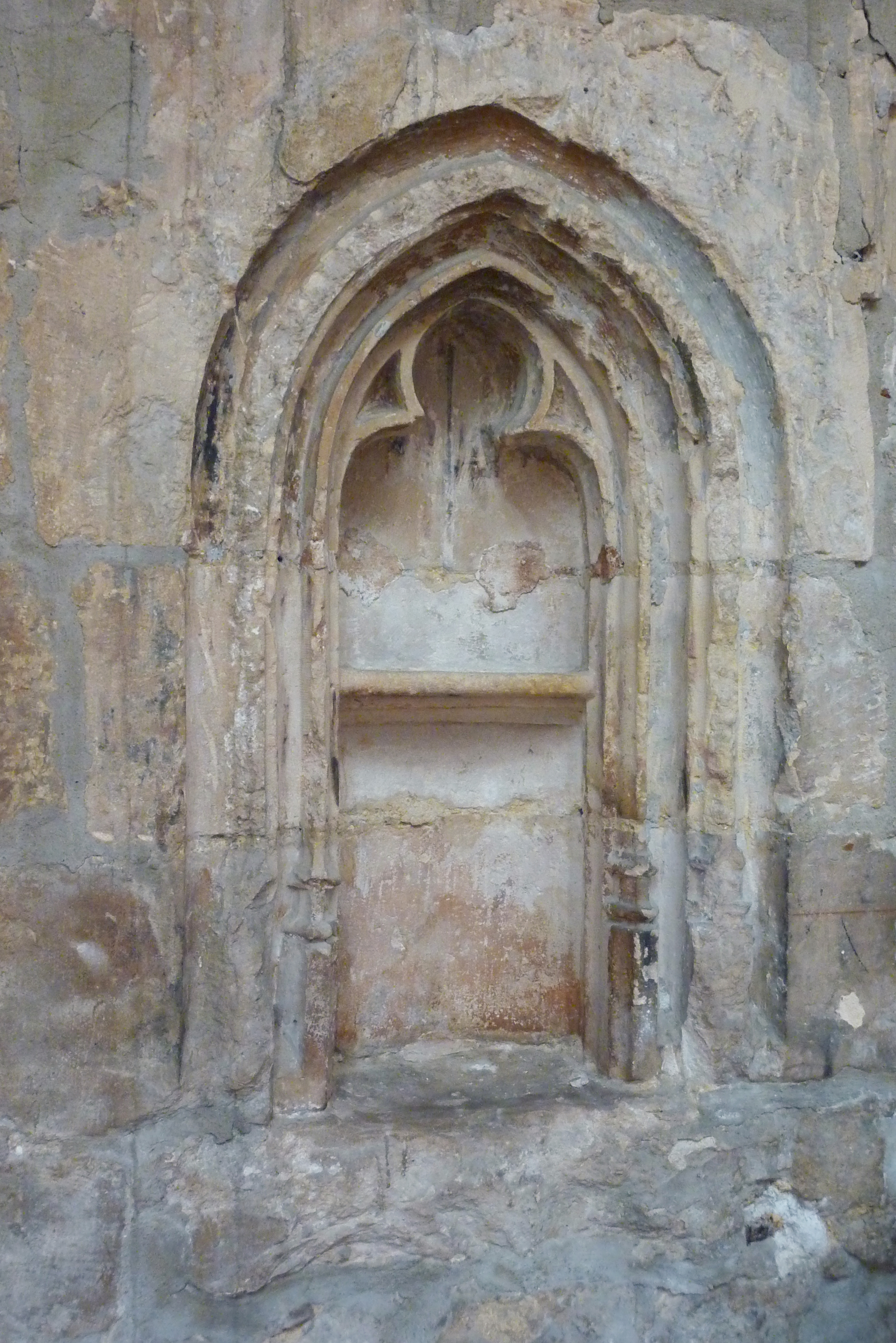 Katholische Pfarrkirche Saint-Aspais in Melun im Département Seine-et-Marne in der Region Île-de-France (Frankreich), gotische Piscina mit Dreipassbogen